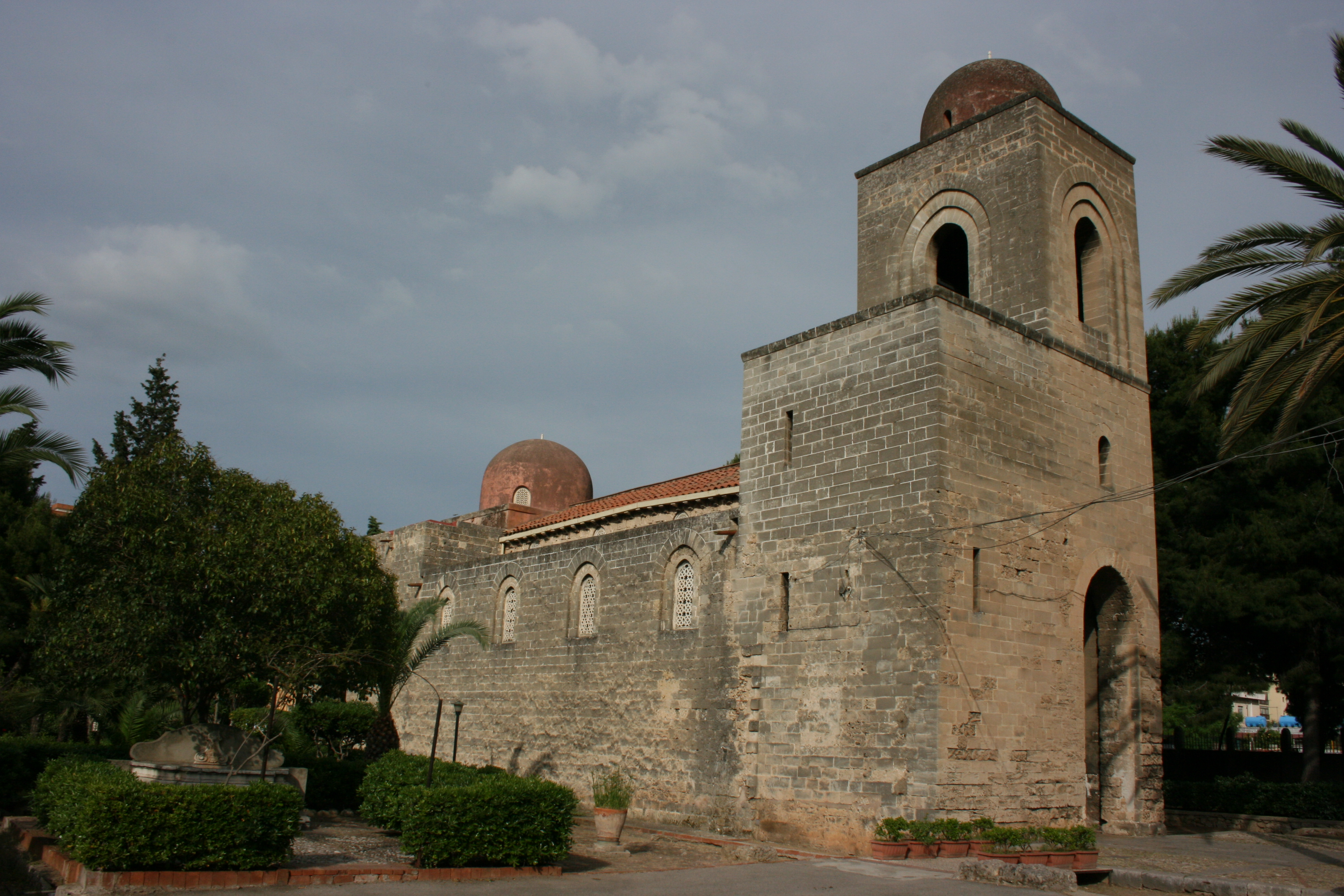 Chiesa di San Giovanni dei Lebbrosi